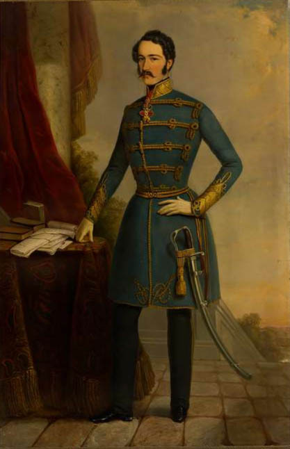 István nádor portréja. Hora János Alajos olajfetménye